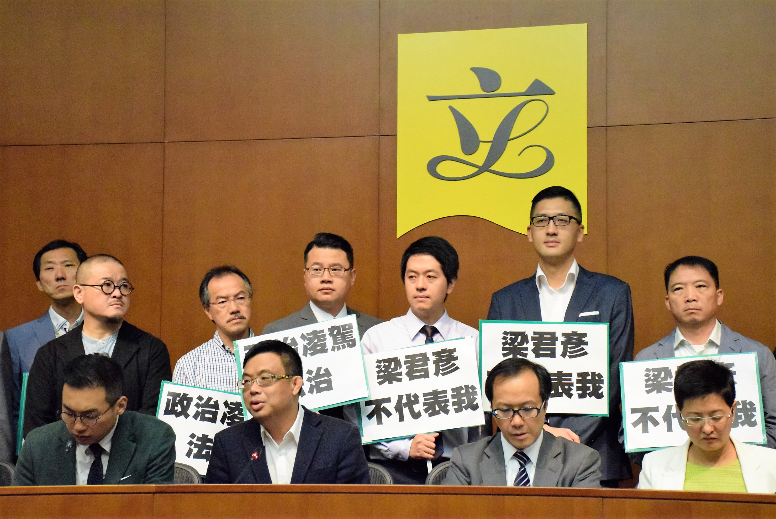 非建制派議員發表聯署信要求立法會主席梁君彥辭職 (美國之音湯惠芸拍攝）